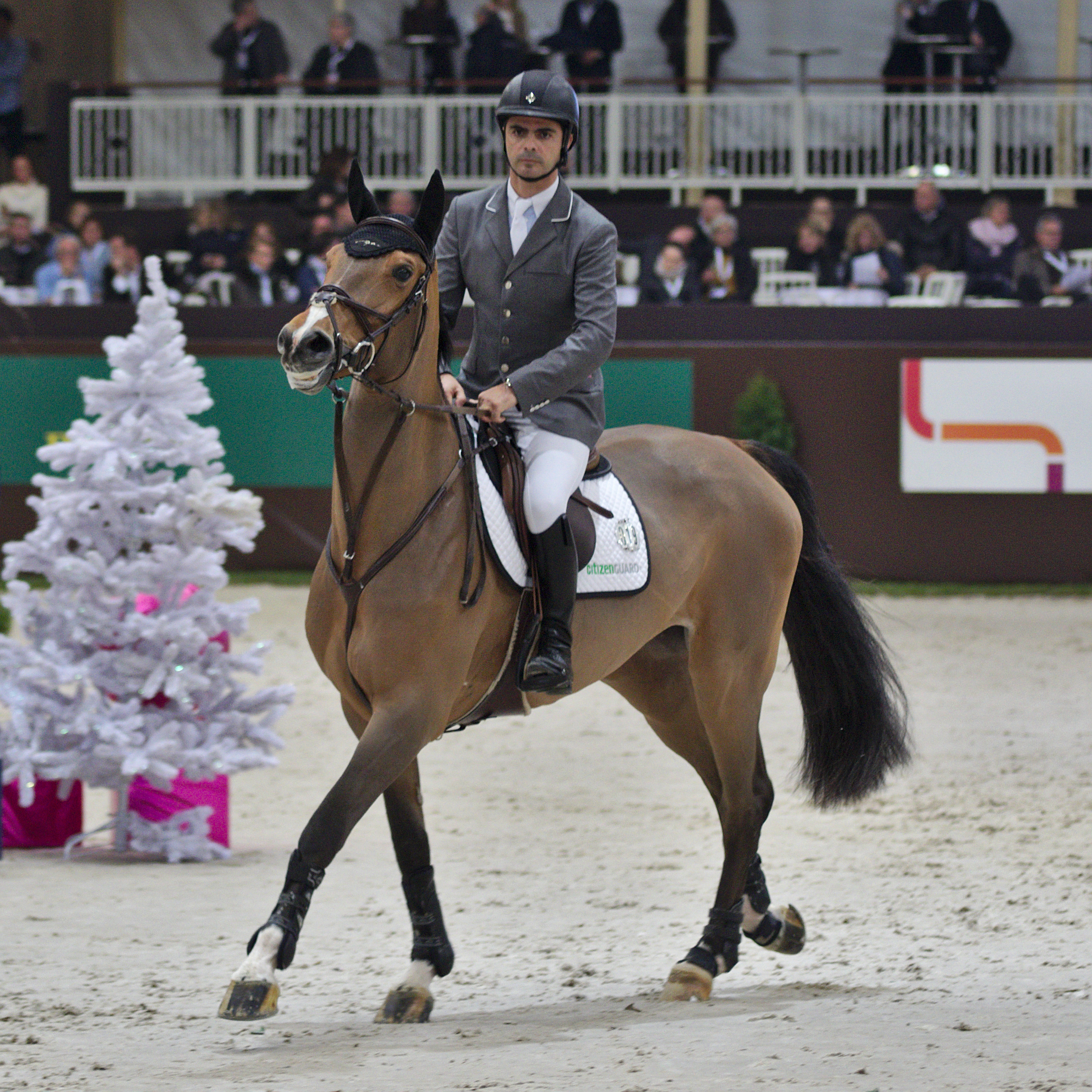 CHI Genève 2013 - 20131212 - Rodrigo Pessoa et Citizenguard Cadjanine Z